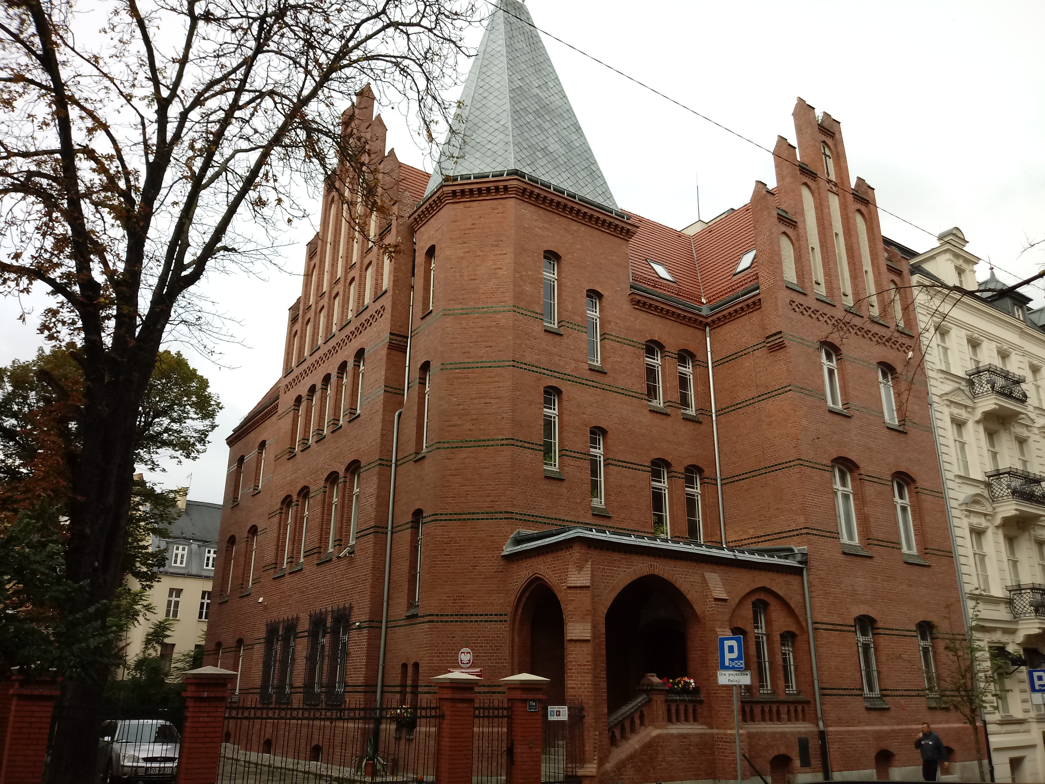 Budynek dawnego Królewskiego Konsystorza (Ewangelickiego) w Poznaniu, ul. Młyńska 11a